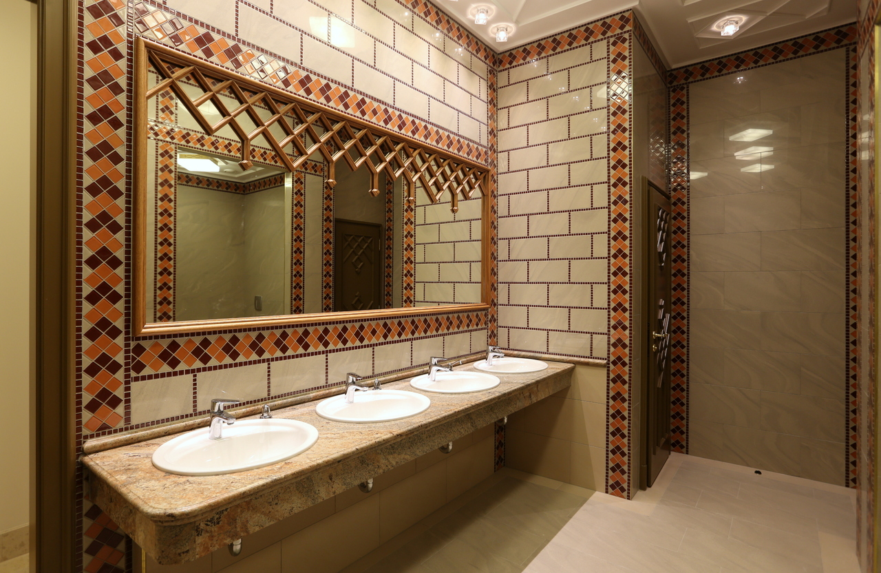 Pesti Vigadó - toalett